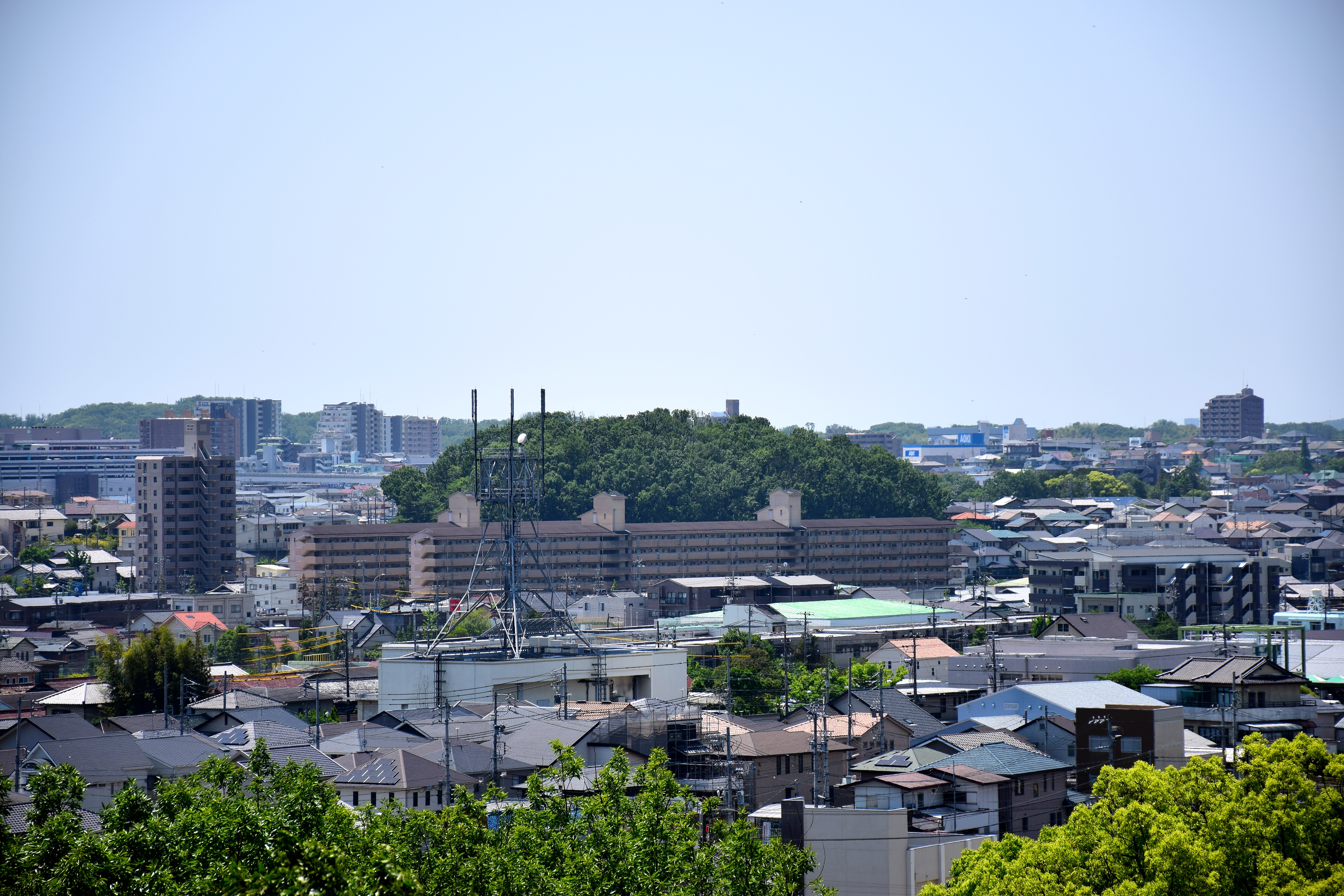 色金山から御旗山を望む